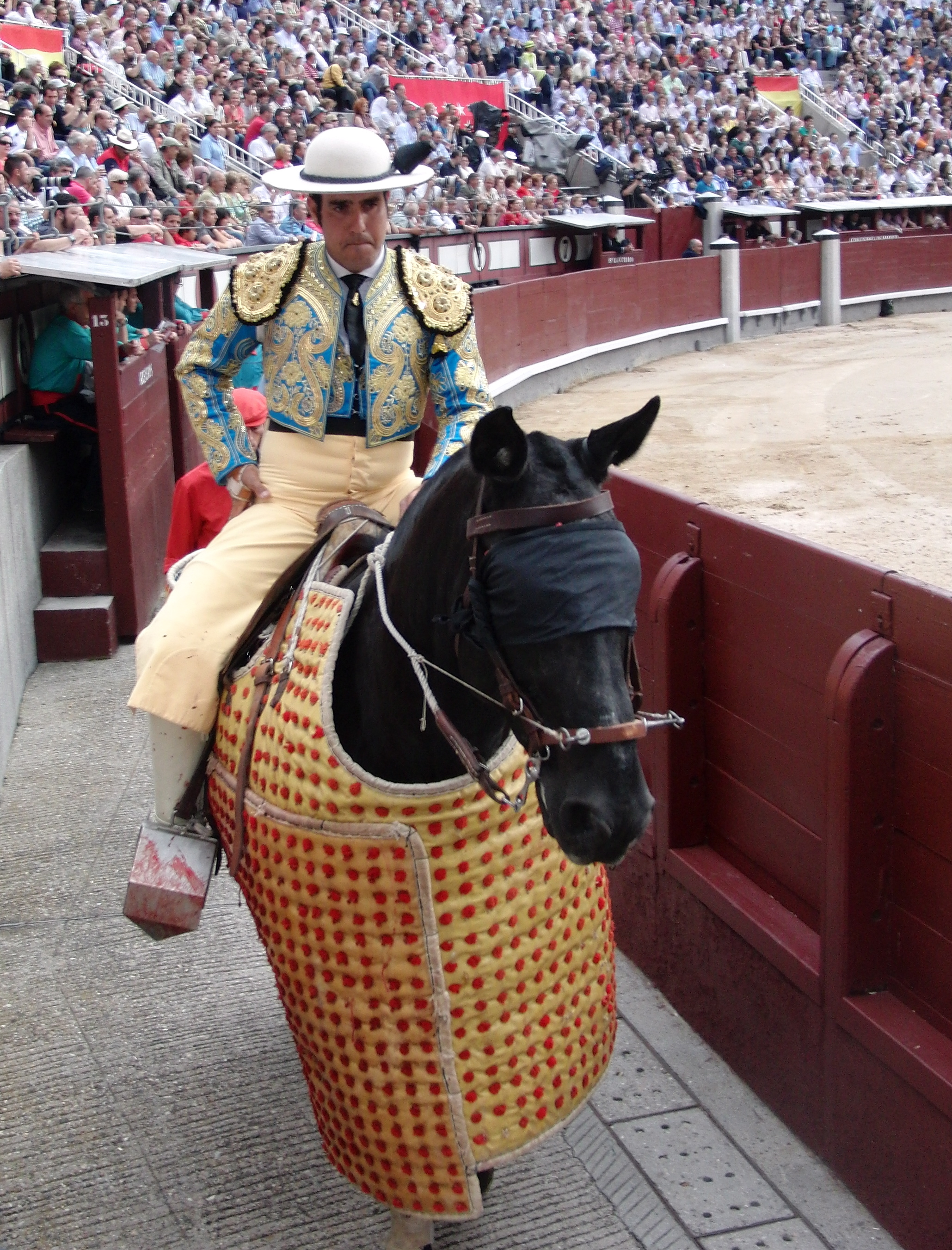 PICADOR